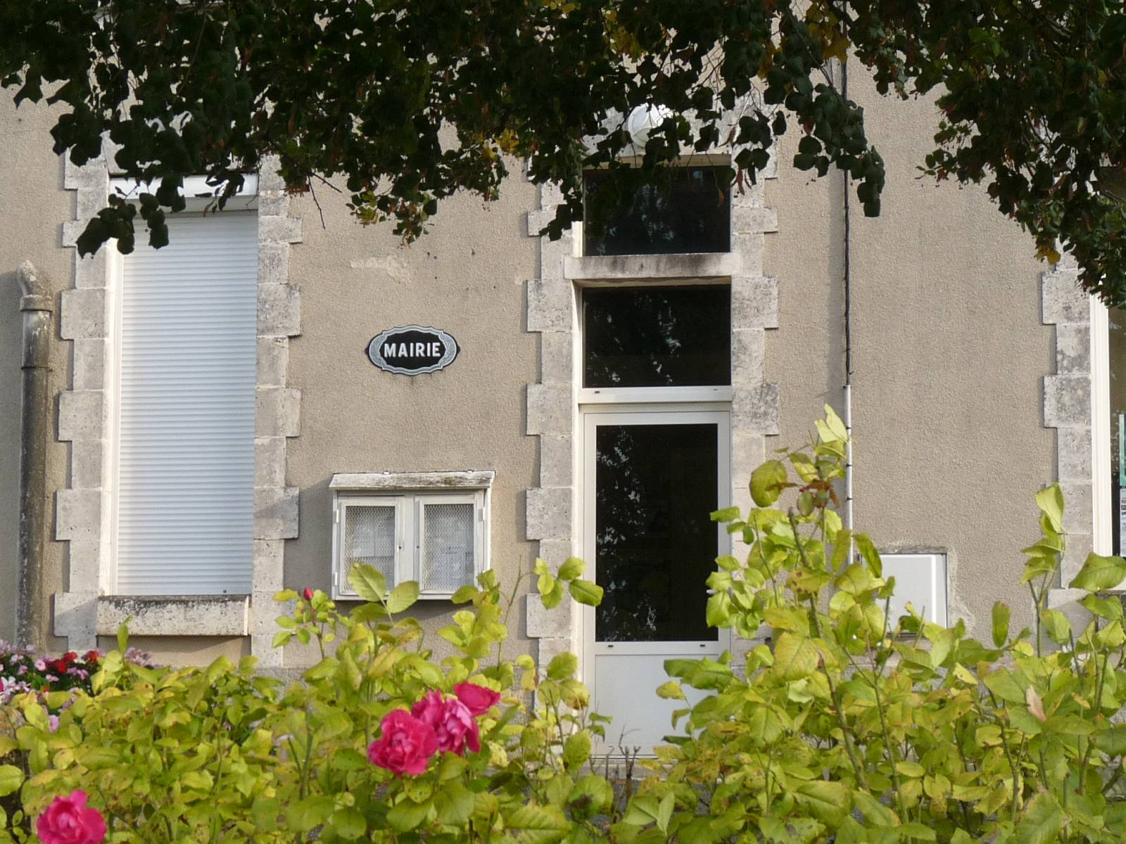 mairie de St-Front, Charente, France